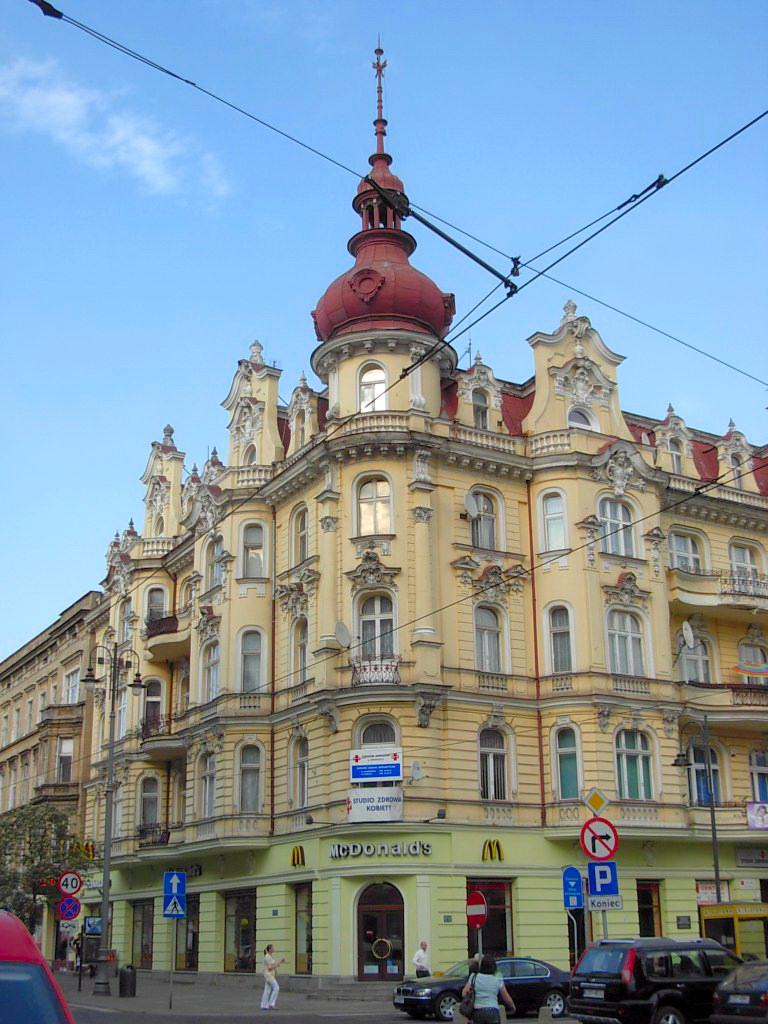 Kamienica Plac Wolności 1 w Bydgoszczy